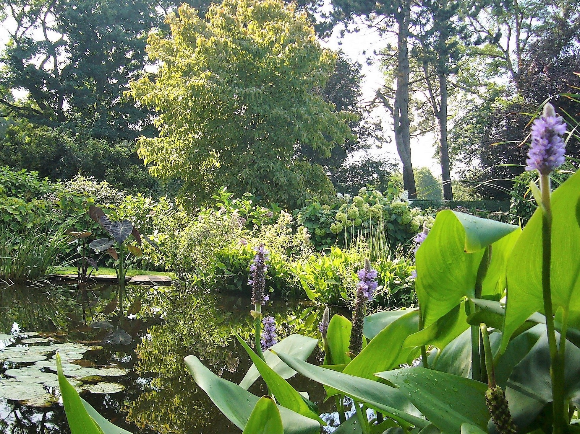 Het landgoed (5,5 ha) werd eind vijftiger jaren van de vorige eeuw aangelegd; het landhuis werd in 1958 gebouwd onder architectuur van Bedaux. De tuinen werden ontworpen door tuinarchitect Van Koolwijk in Engelse landschapsstijl met gazons, borders, vijvers, een ommuurde tuin en bosaanplant. Een grote verscheidenheid aan in- en uitheemse bomen en struiken werd aangeplant. In 2012 werd Stichting Landgoed De Hertgang opgericht om de tuinen en het arboretum open te stellen en in stand te houden.